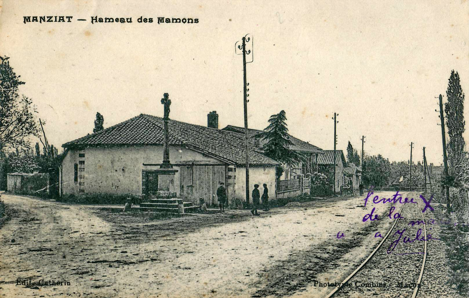 Carte postale ancienne éditée par Catherin - Phototypie Combier à Mâcon : MANZIAT - Hameau des Hamons.Vue en gros plan de la voie en accotement de la Compagnie des chemins de fer économiques du Sud-Est (Tramways de l'Ain)